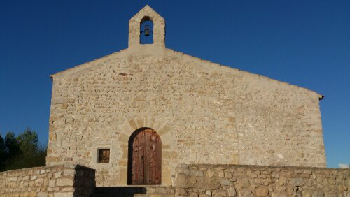 Ermita San Cristobal